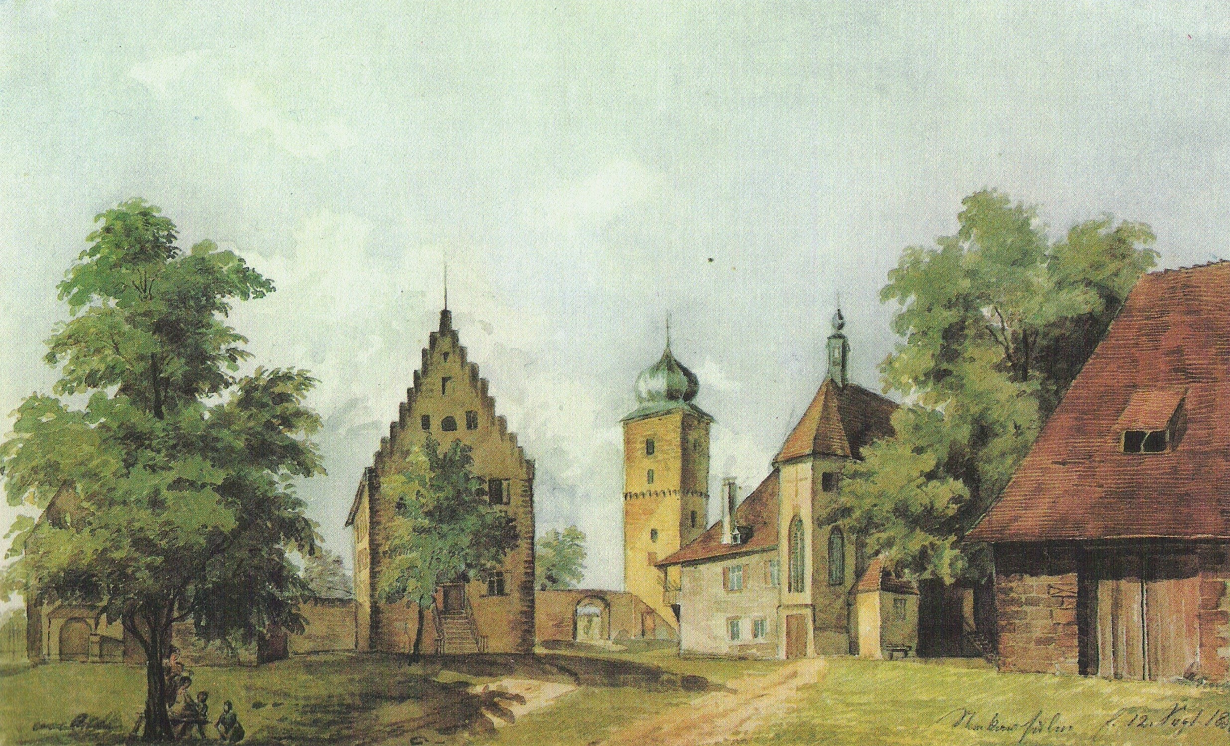 „Neckarsulm, ehemaliges Deutschordensschloß (Steinhaus-Saalbau, Bergfried und Schloßkapelle)“